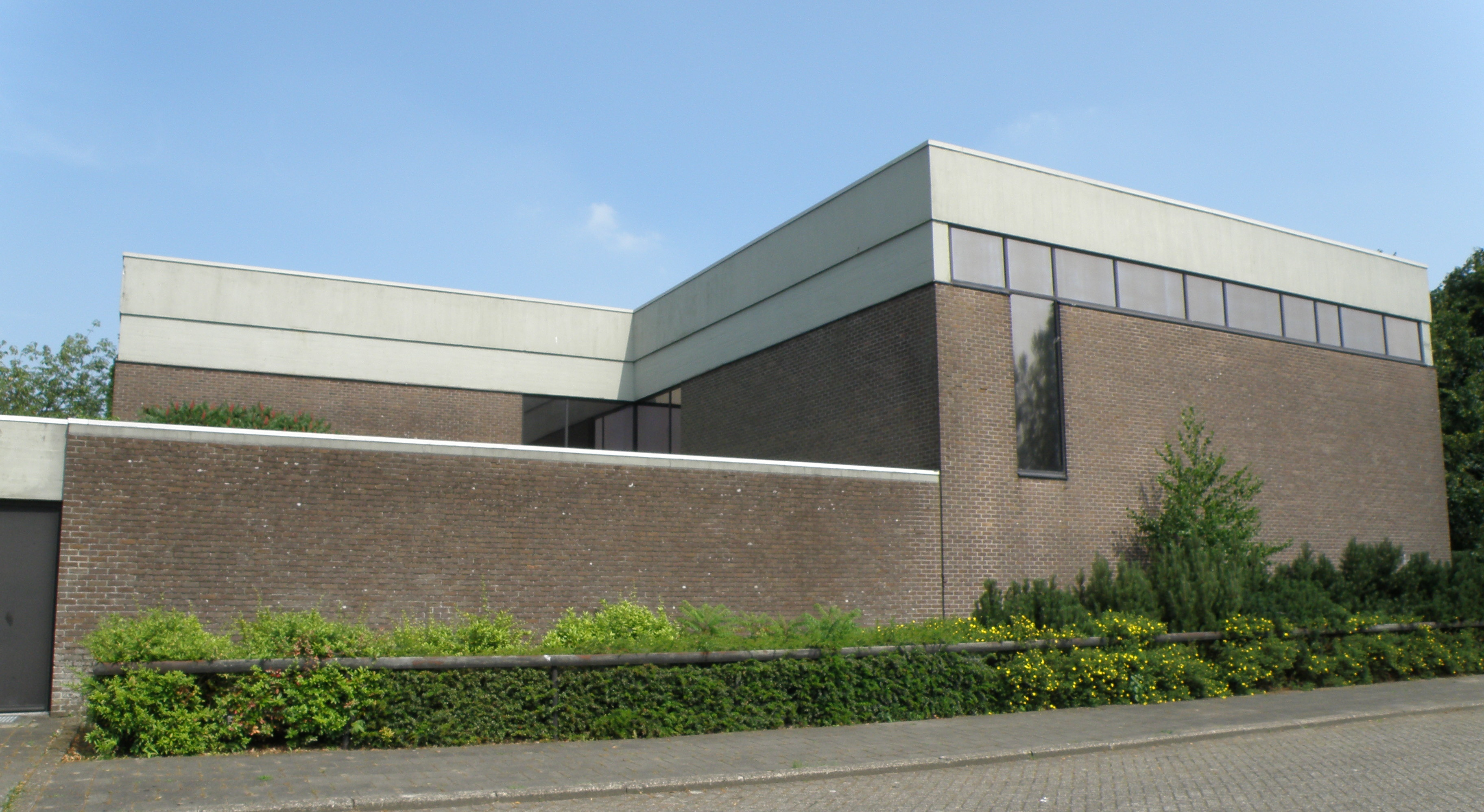 Vosselaar, prov. Antwerpen, België. Sint-Jozef-Arbeiderkerk, 1967, n.o.v. Marc Dessauvage.